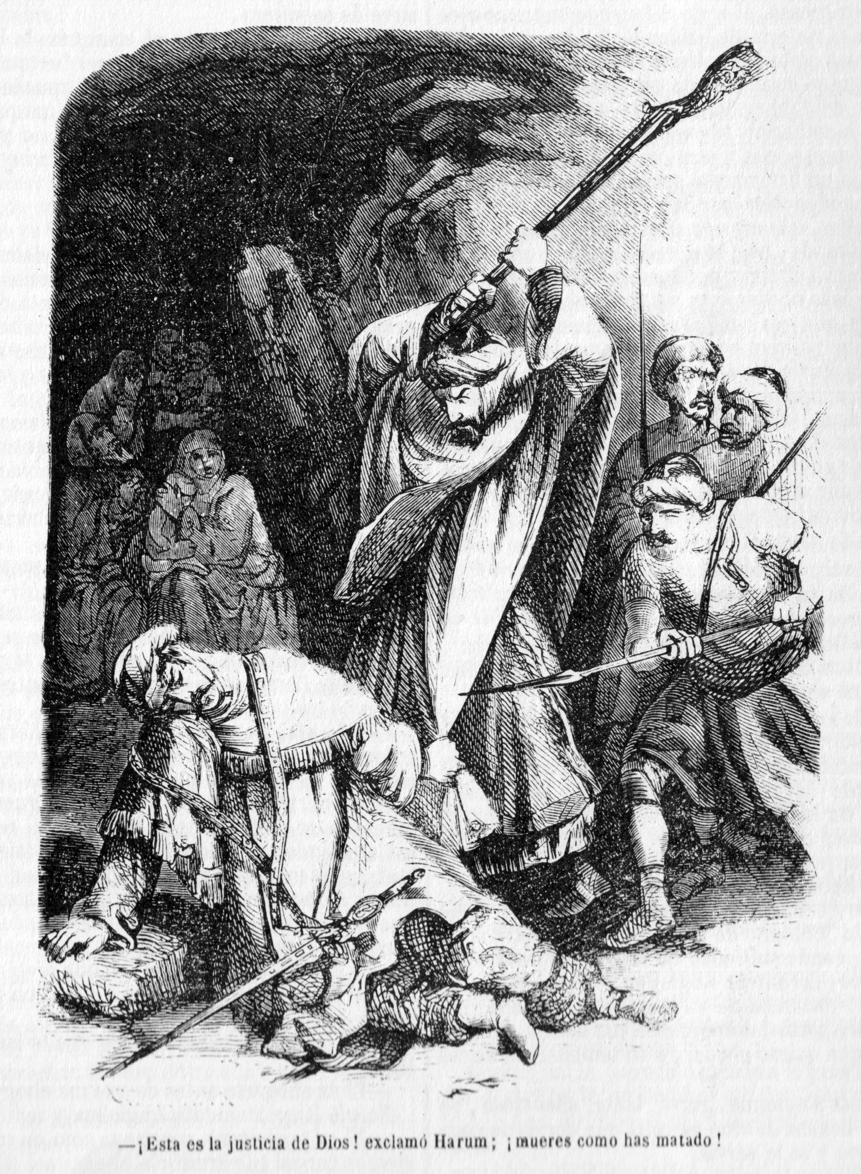 Esta es la justicia de Dios! exclamo Harum; mueres como has matado !